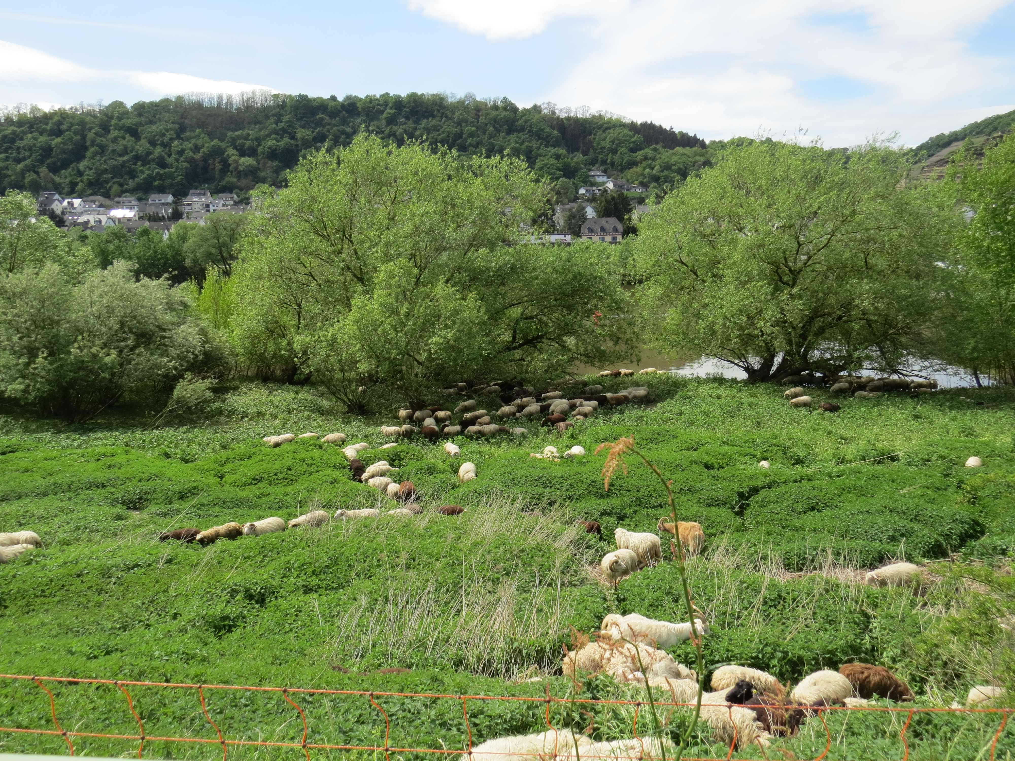 Das Naturschutzgebiet „Moselufer zwischen Niederfell und Dieblich“ (NSG 7137-033) wird von Schafen und Ziegen für die streng geschützte Würfelnatter vom hohen Bewuchs befreit; Landkreis Mayen-Koblenz, Rheinland-Pfalz